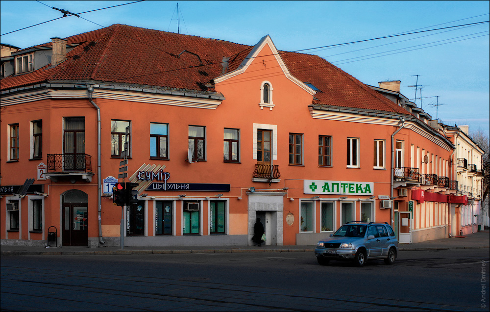 вул. Першамайская